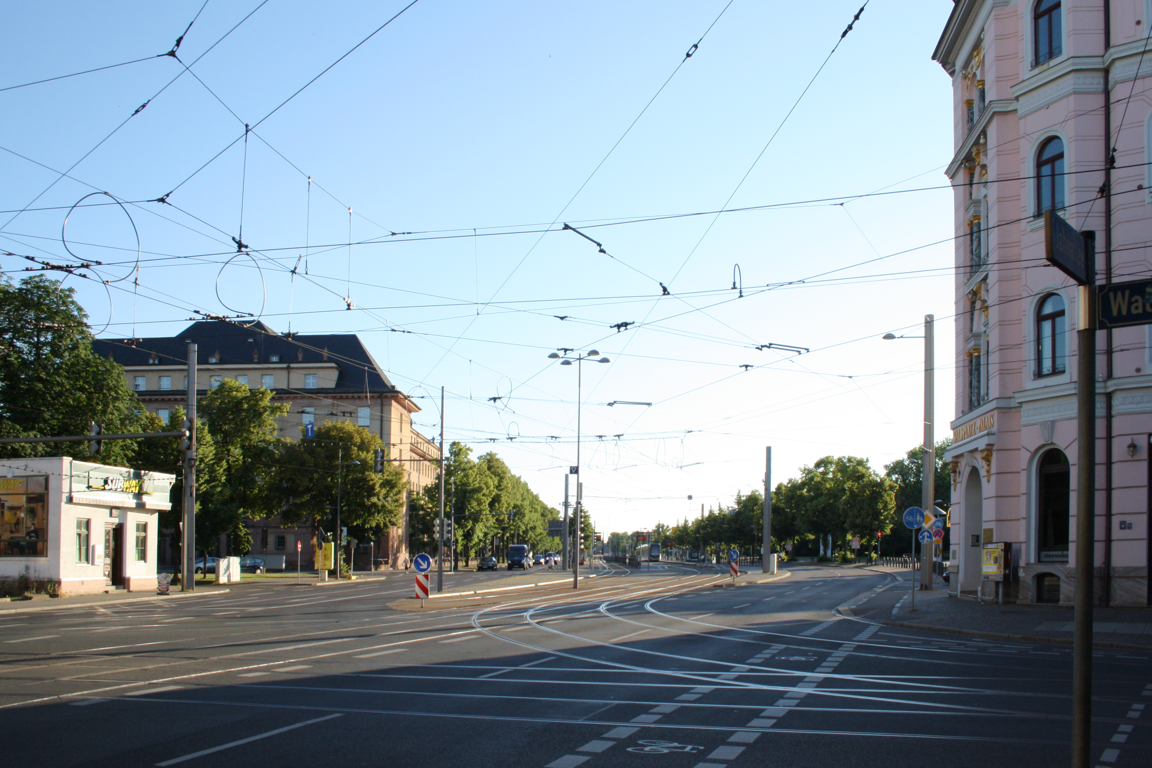 Jahnallee vom Waldplatz Richtung Westen